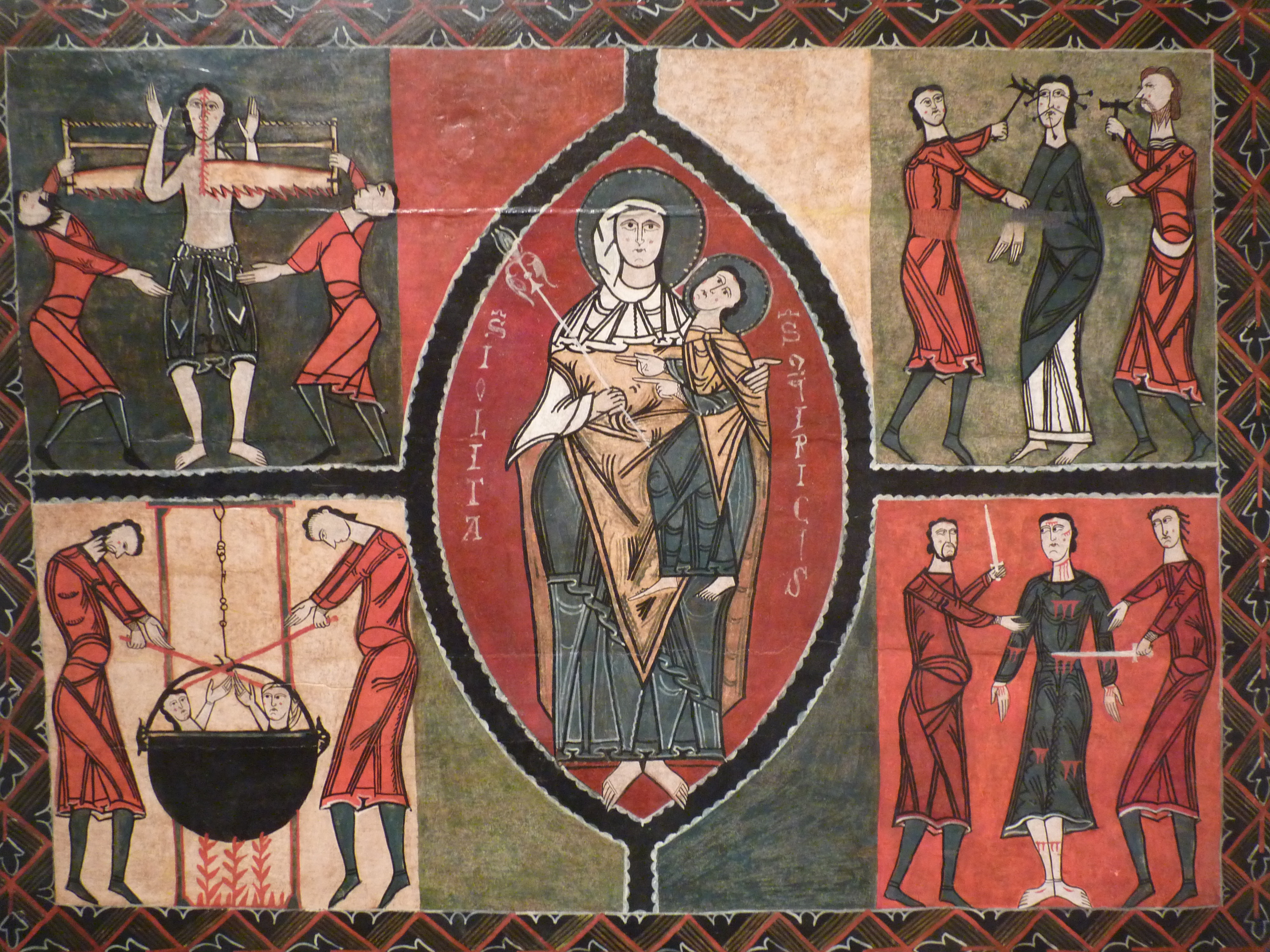 Frontal d'altar de Durro